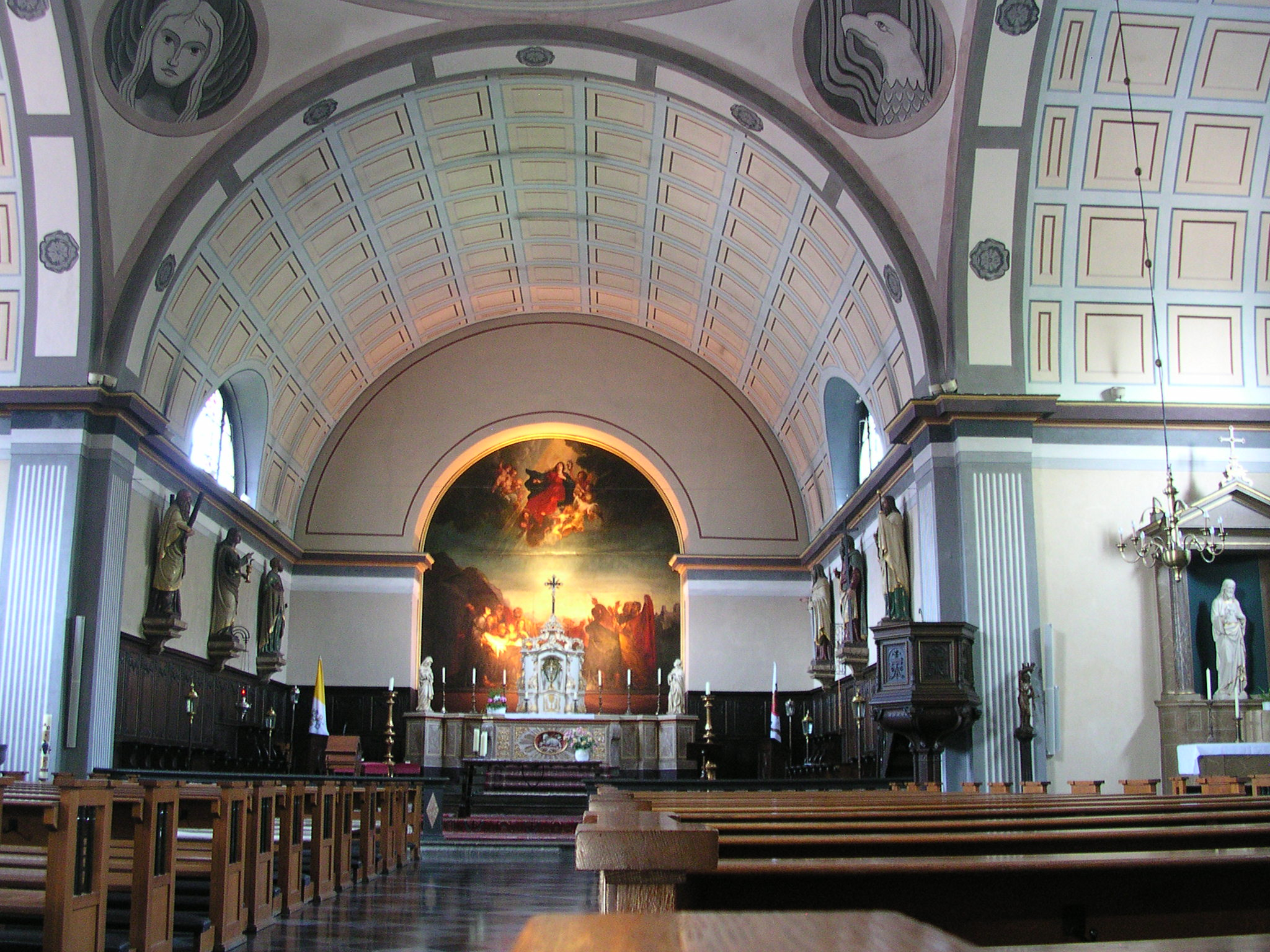 Marienkirche in Geilenkirchen